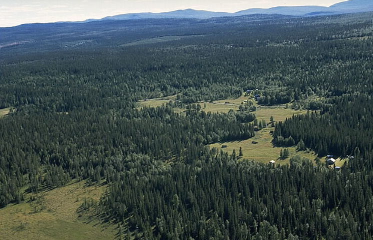 Motiv: Vivallen Nyckelord: Flygbilder, Riksintressen Kategori: FäbodsmiljöVivallen